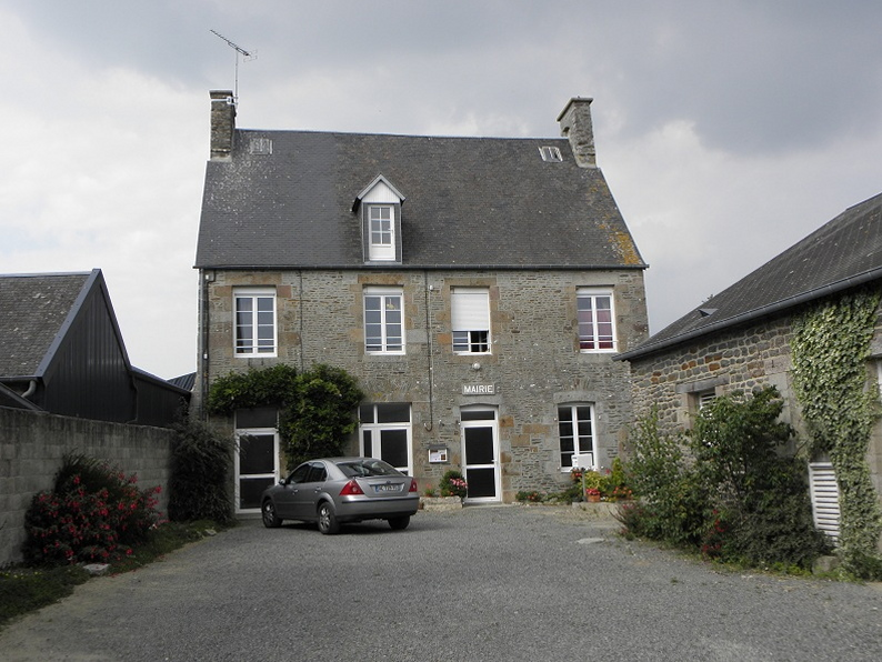 Mairie de Tanis (50).